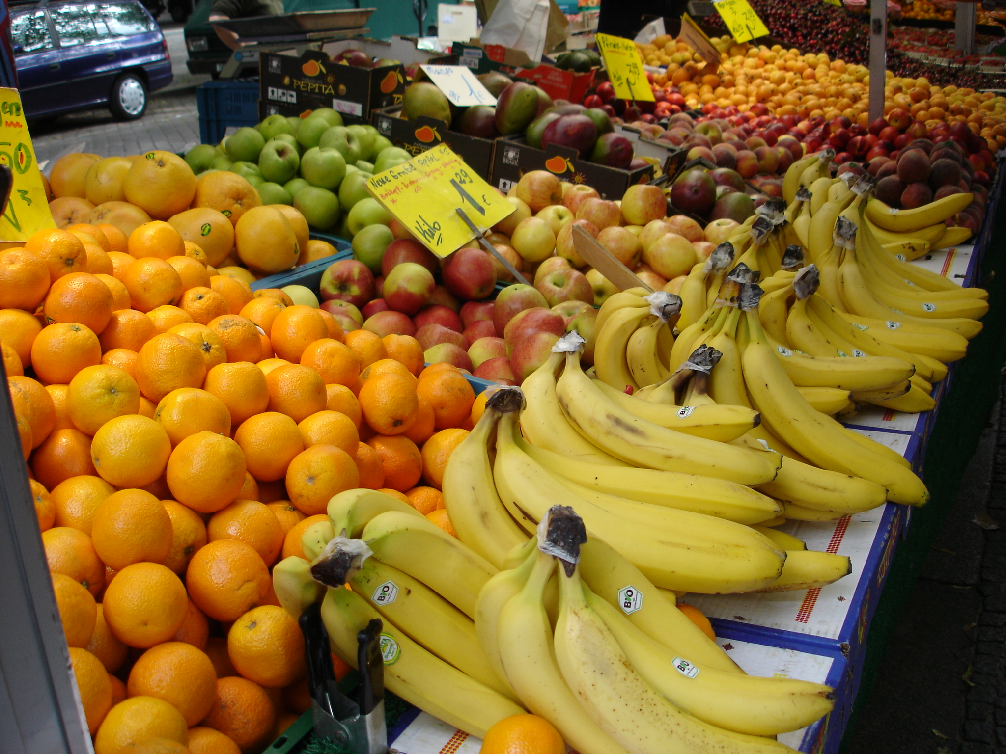 Wochenmarkt Karl-August-Platz Berlin Charlottenburg Wochenmarkt